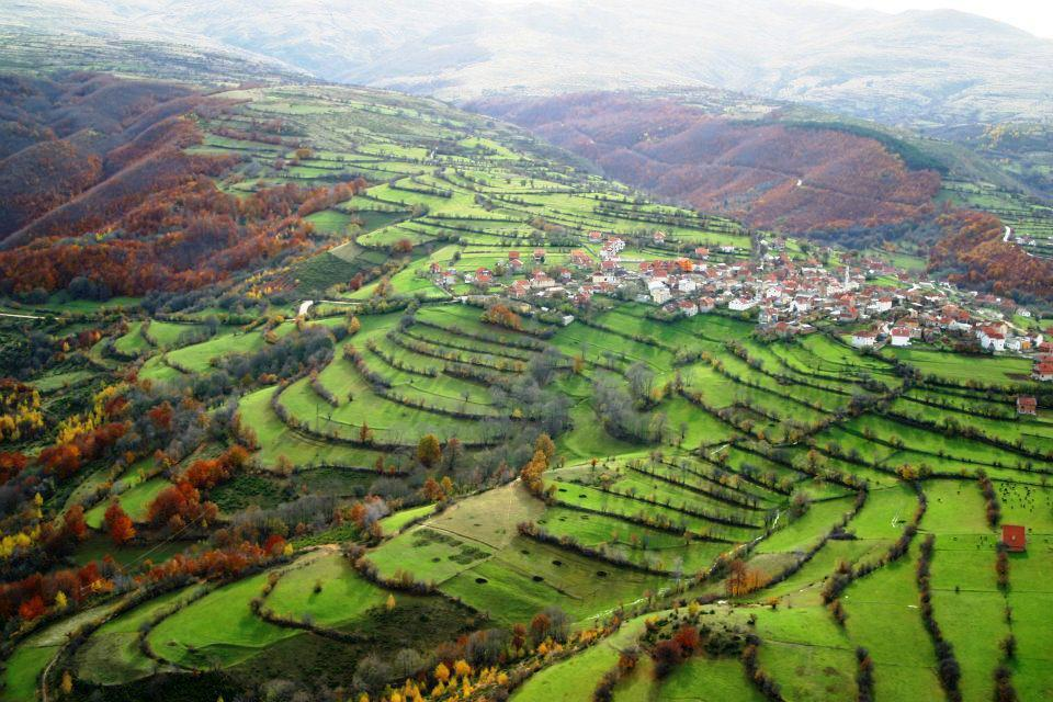 Ne kete foto eshte e paraqitur nje pjese e fshatit Shajne ku shihen bukuri natyrore